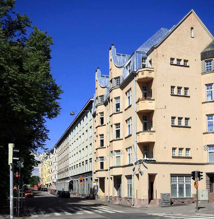 Lapinlahdenkatu, Helsinki.